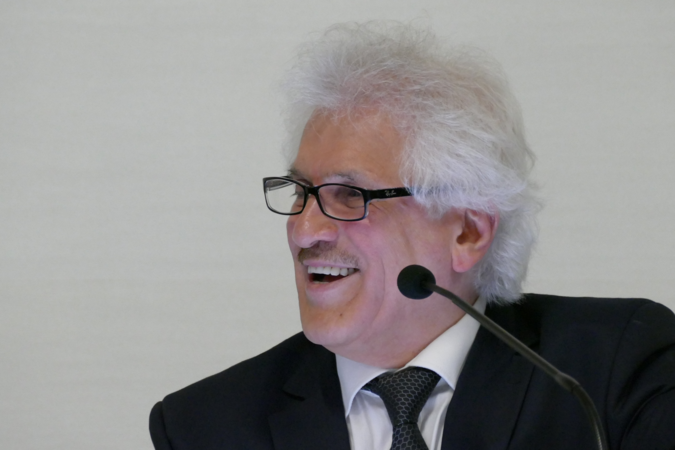 Feryad Fazil Omar bei seiner Buchpräsentation 2016 an der Freien Universität Berlin.